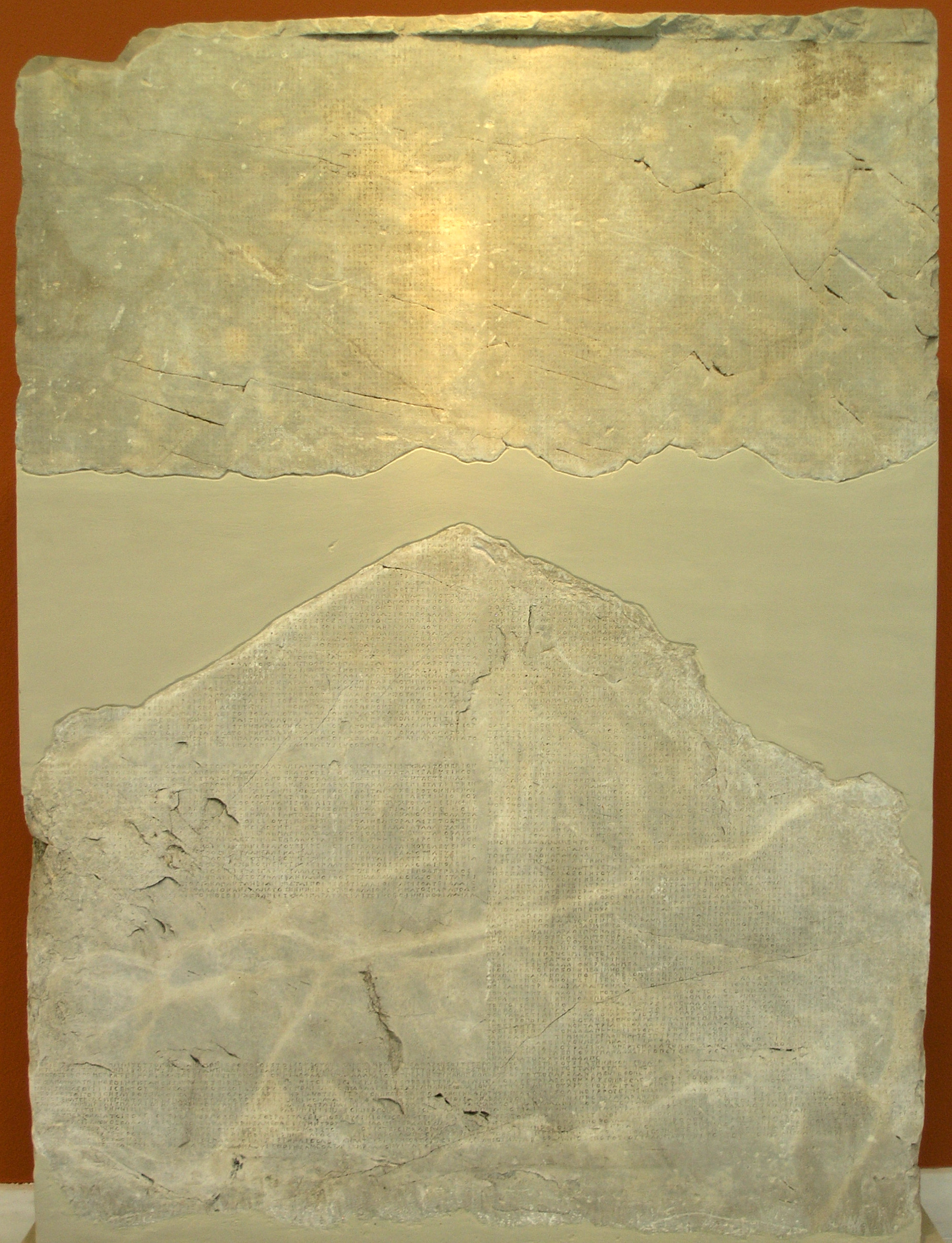 Comptes des épistates éleusiniens et des trésoriers de Déméter et de Korè, datés de 329/8 av. J.-C